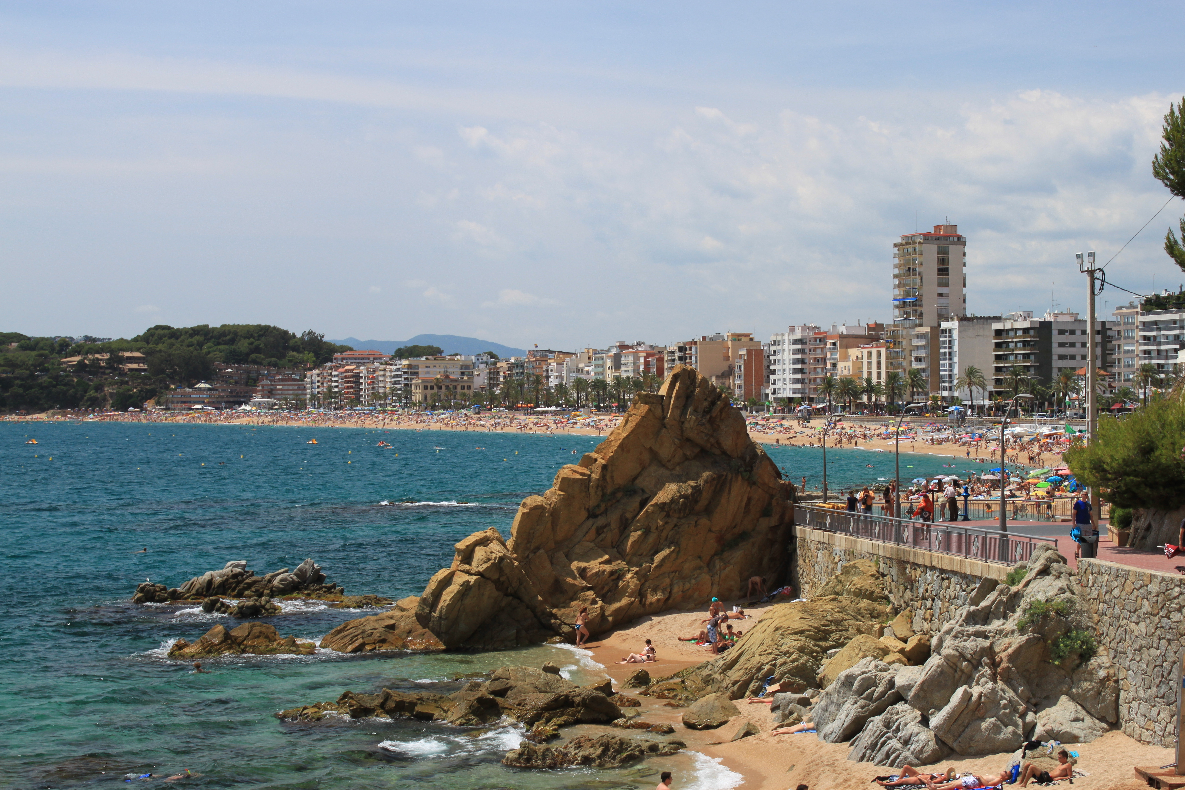 Пляж в Льорет-де-Мар, июль 2012 года